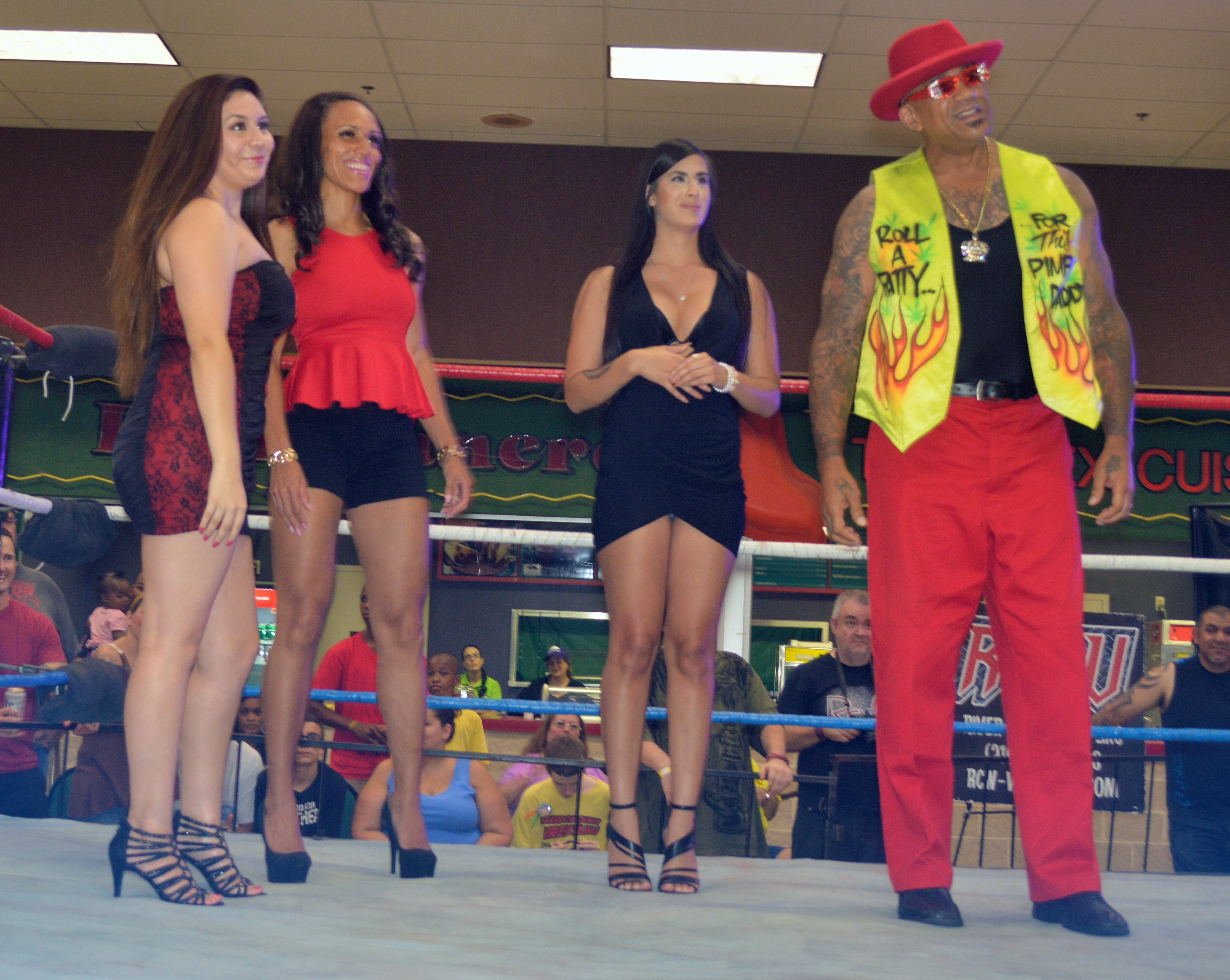 Le catcheur The Godfather et ses Ho's (le surnom des jeunes femmes qui l'accompagne).